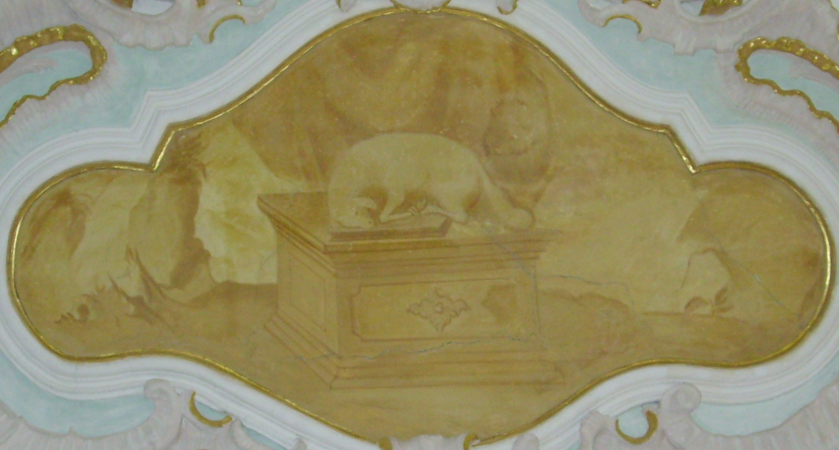 Deckensecco in der Wallfahrtskirche Heilig Kreuz in Mindelaltheim